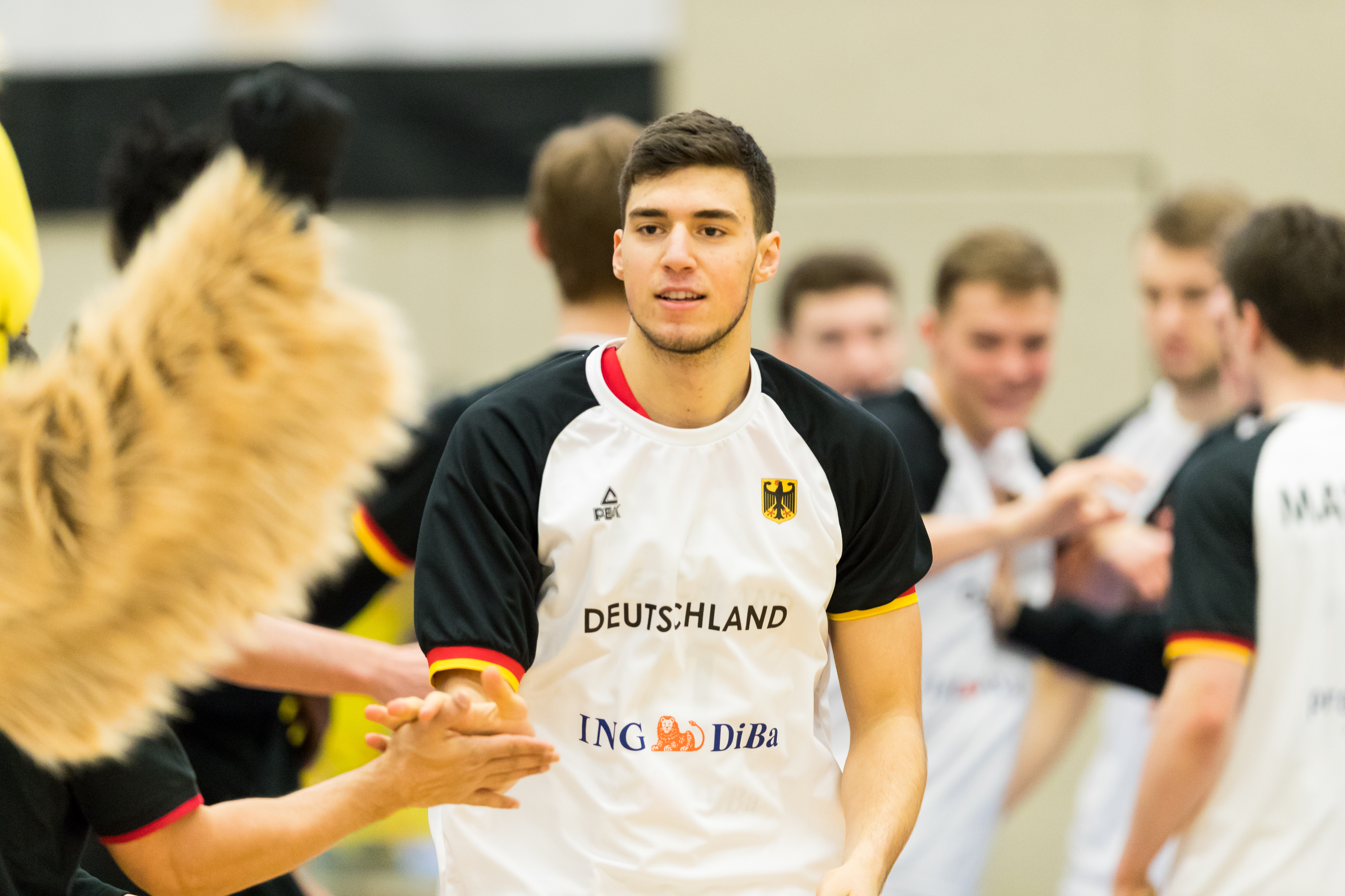 Germany vs Turkey 74:70 during Basketball Albert Schweitzer Turnier at GBG Halle, Mannheim, Baden-Württemberg, Germany on 2018-04-02, Photo: Sven Mandel